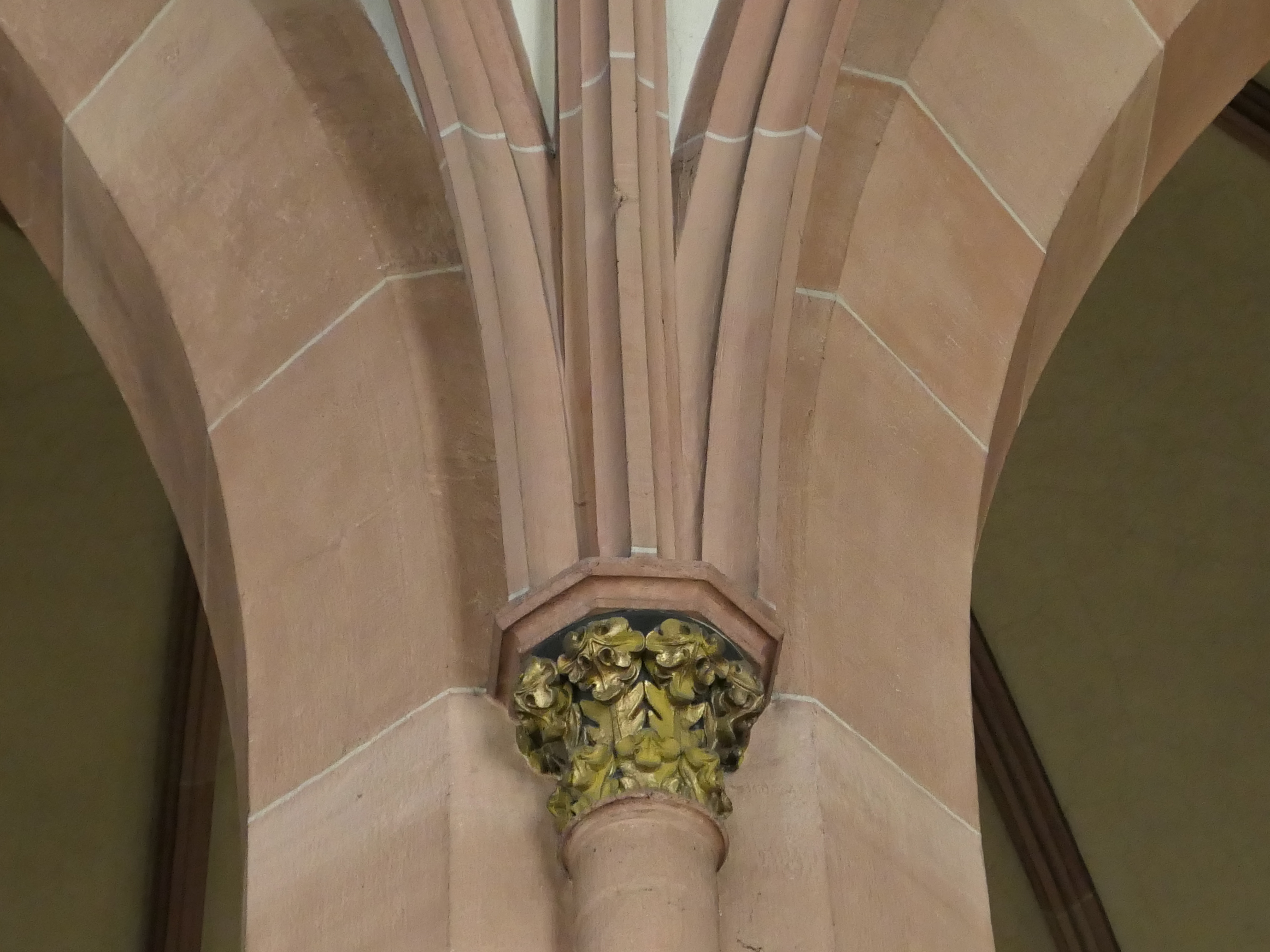 Stiftskirche Baden-Baden Kragstein